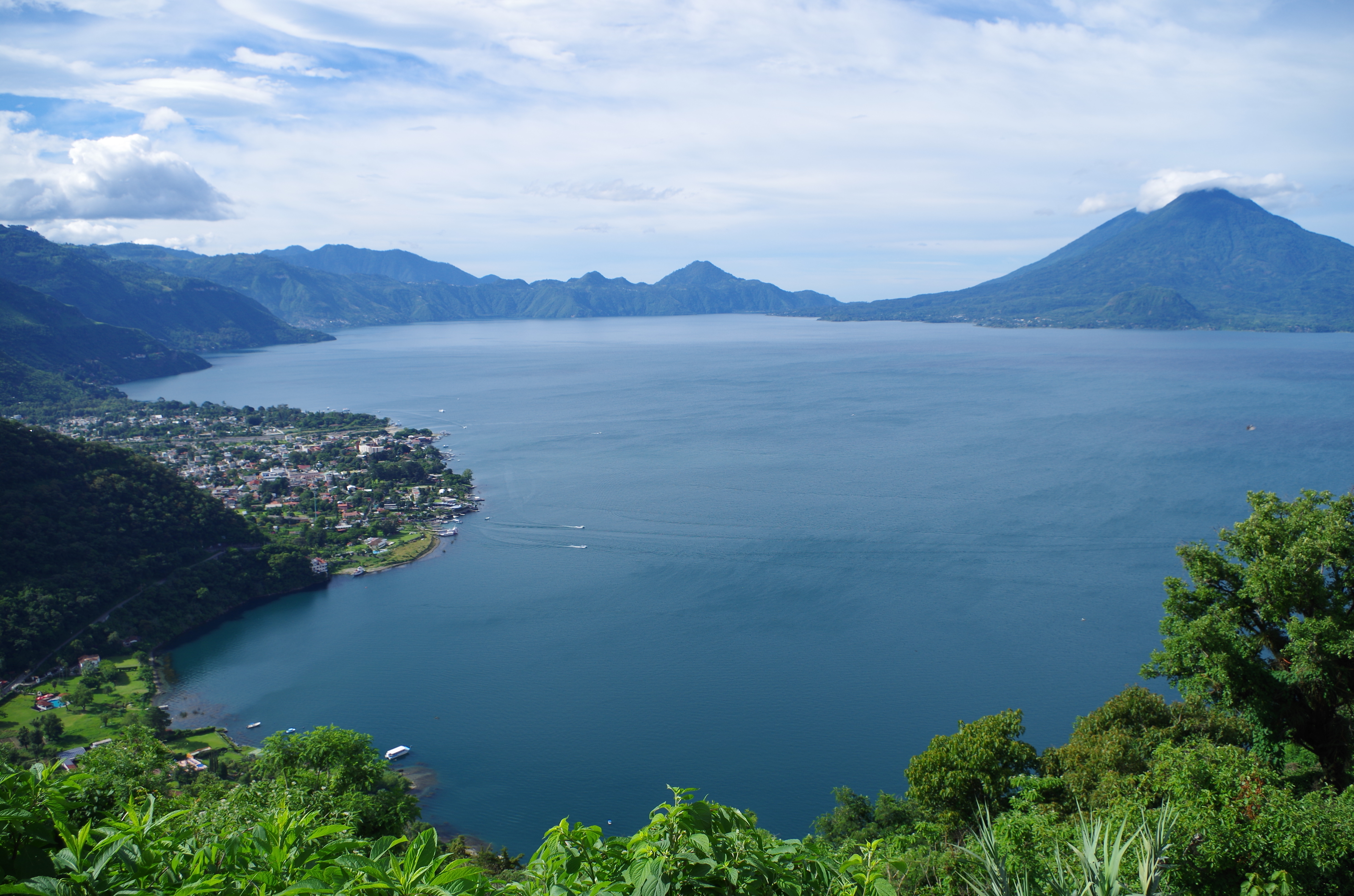 Lago de Atitlán en Guatemala con el pueblo de Panajachel visto de lado izquierdo